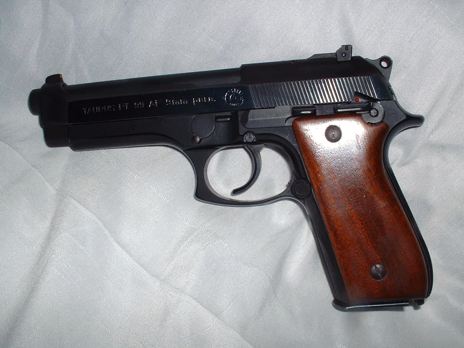 Taurus PT99 AF